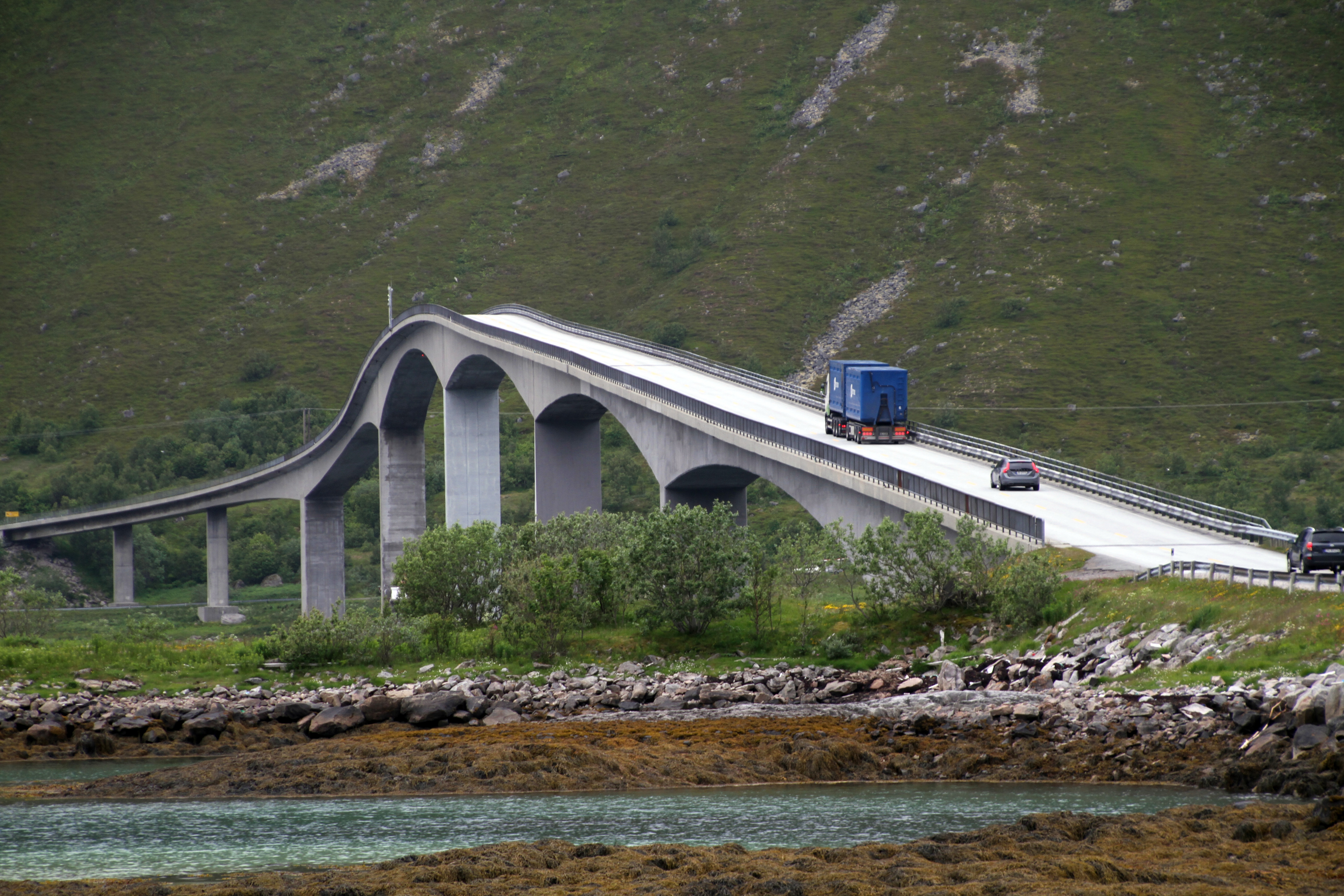 Gimsøystraumen-Bruecke zwischen Austvågøy und Gimsøy (Lofoten, Norwegen)